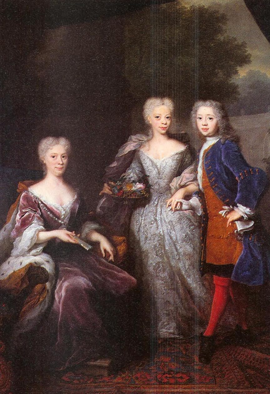 Maria Louise van Hessen-Kassel, weduwe van stadhouder Johan Willem Friso met haar twee kinderen.